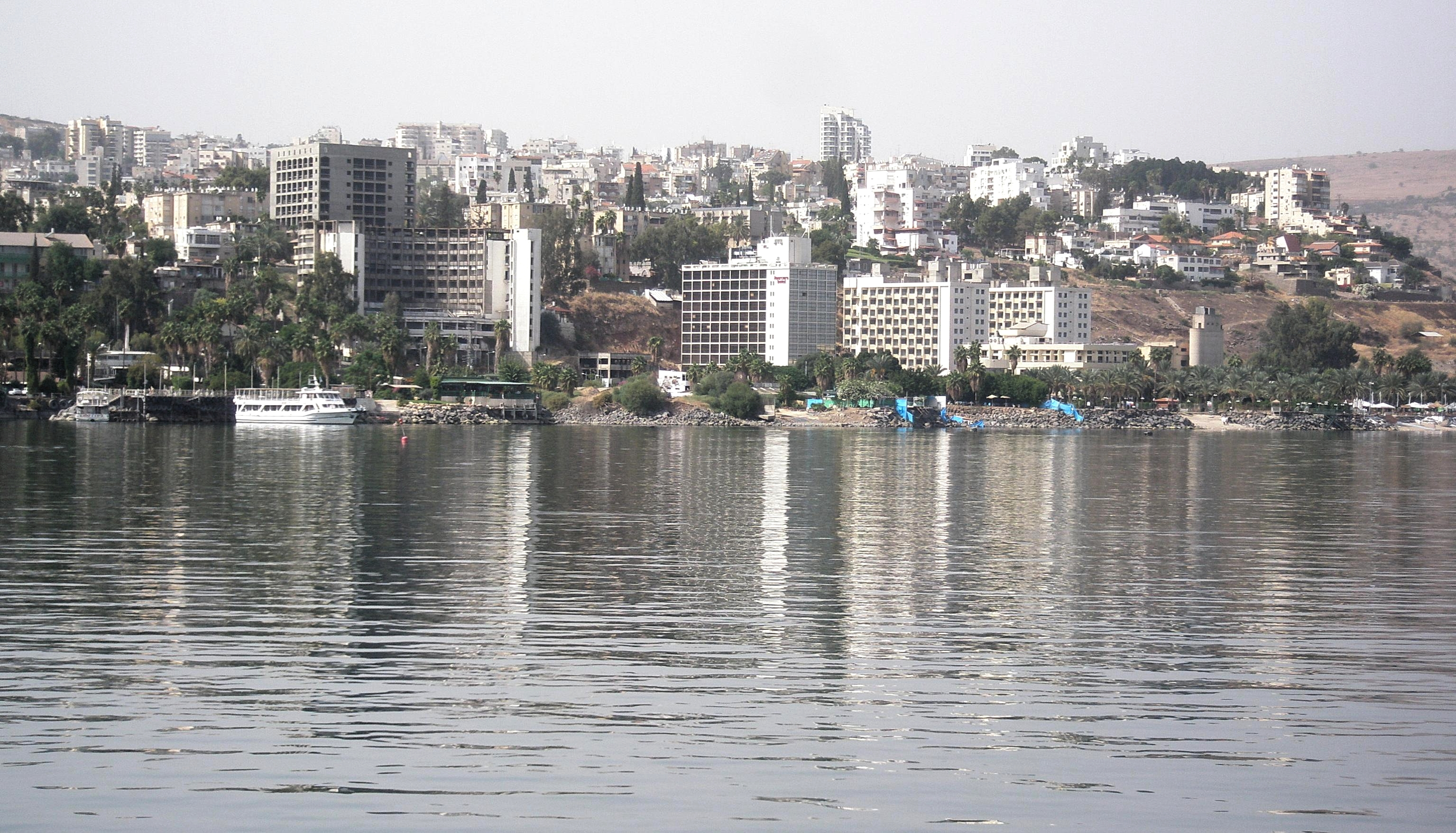 Hotels in Tiberias